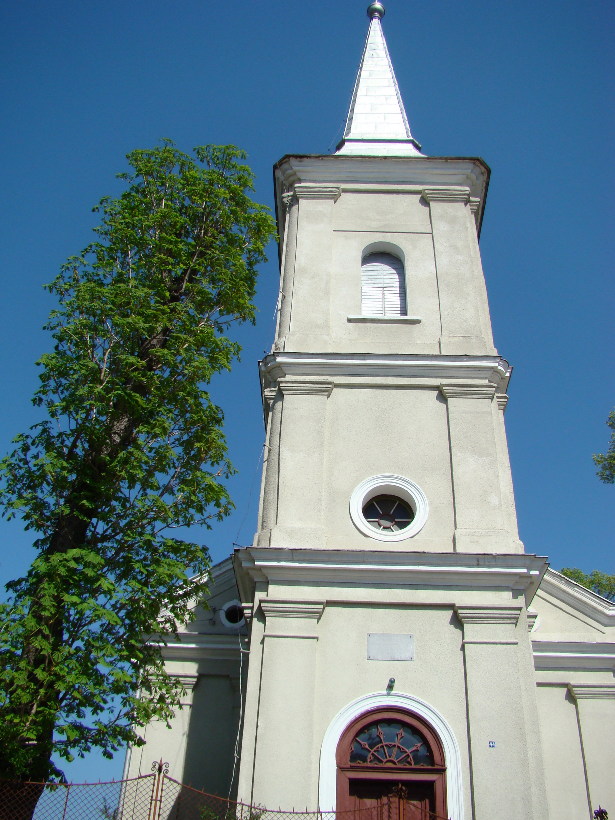 Biserică reformată din Hațeg